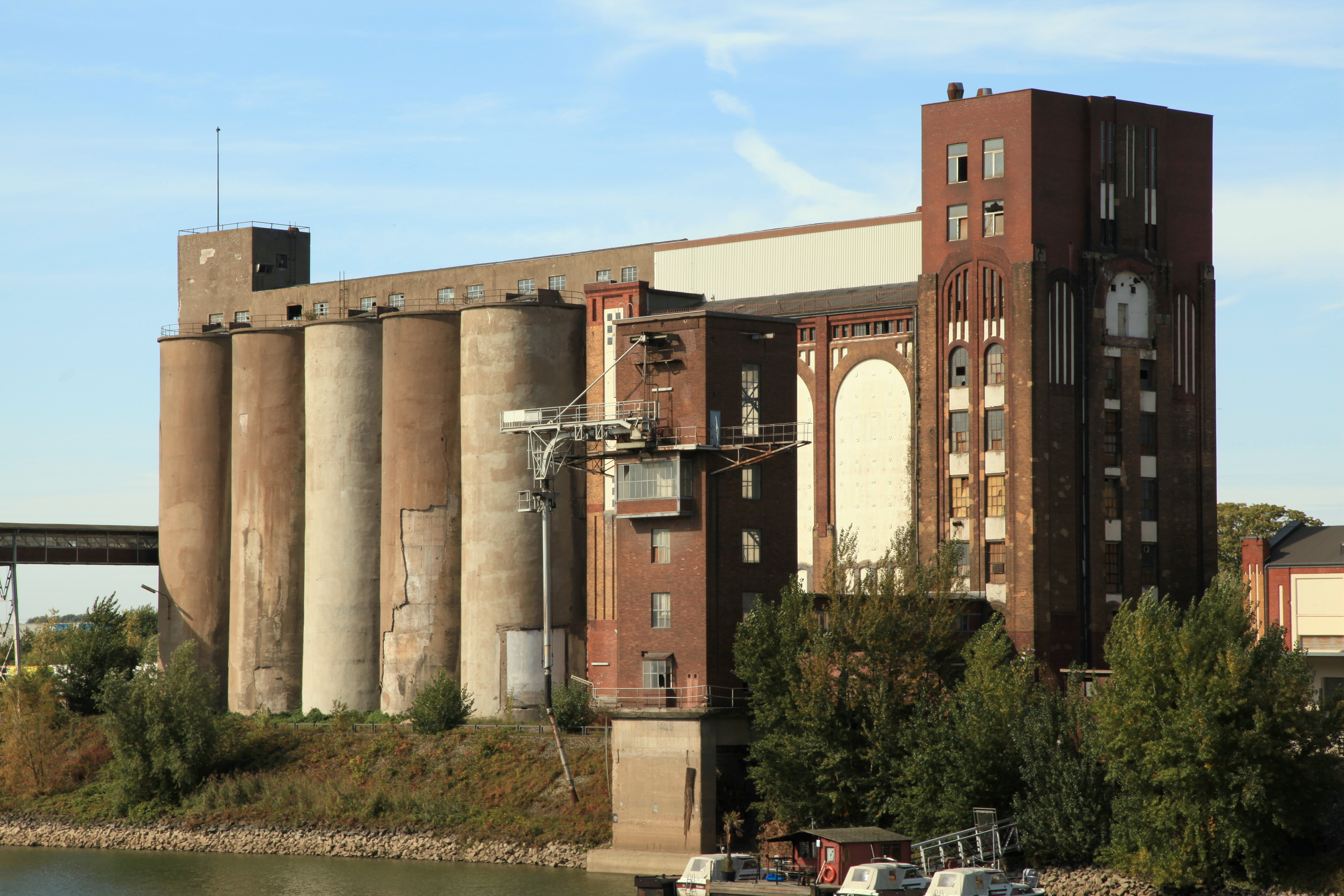 Silobauten der Plange-Mühle im Düsseldorfer Hafen, Blick von der Speditionstraße